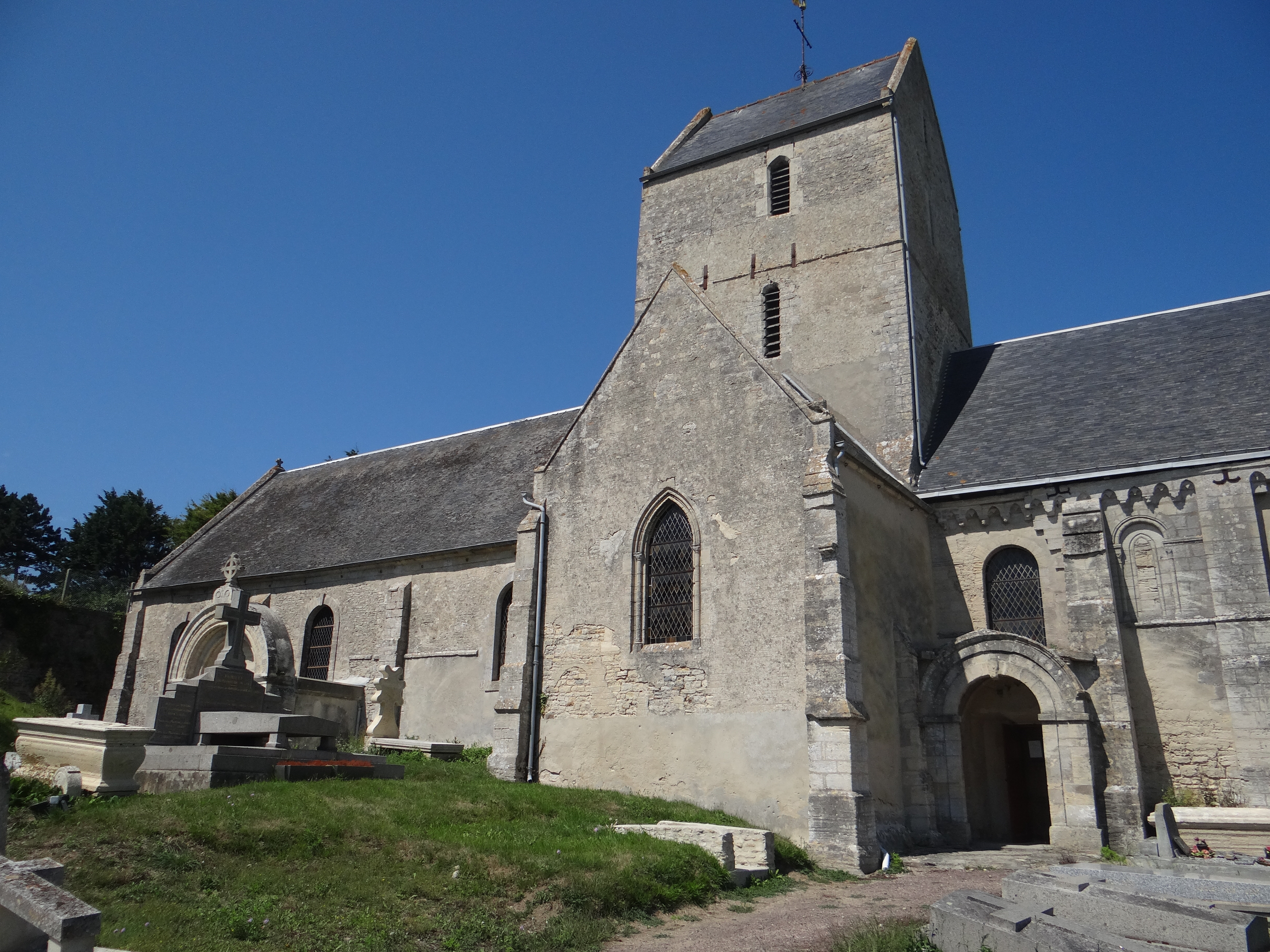 Église de Saint-Côme et Saint-Damien, Saint-Côme-de-Fresné, Calvados, France.